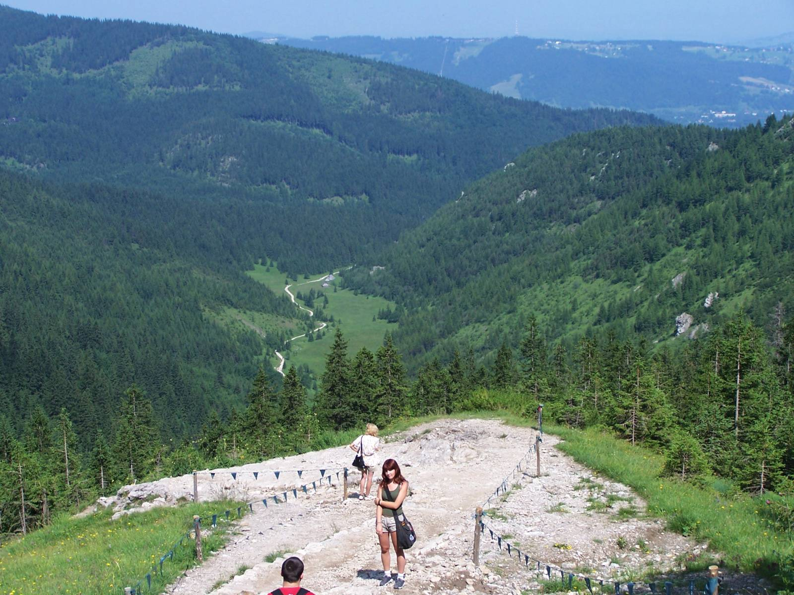 Dolina Jaworzynki (Tatra Mountains)